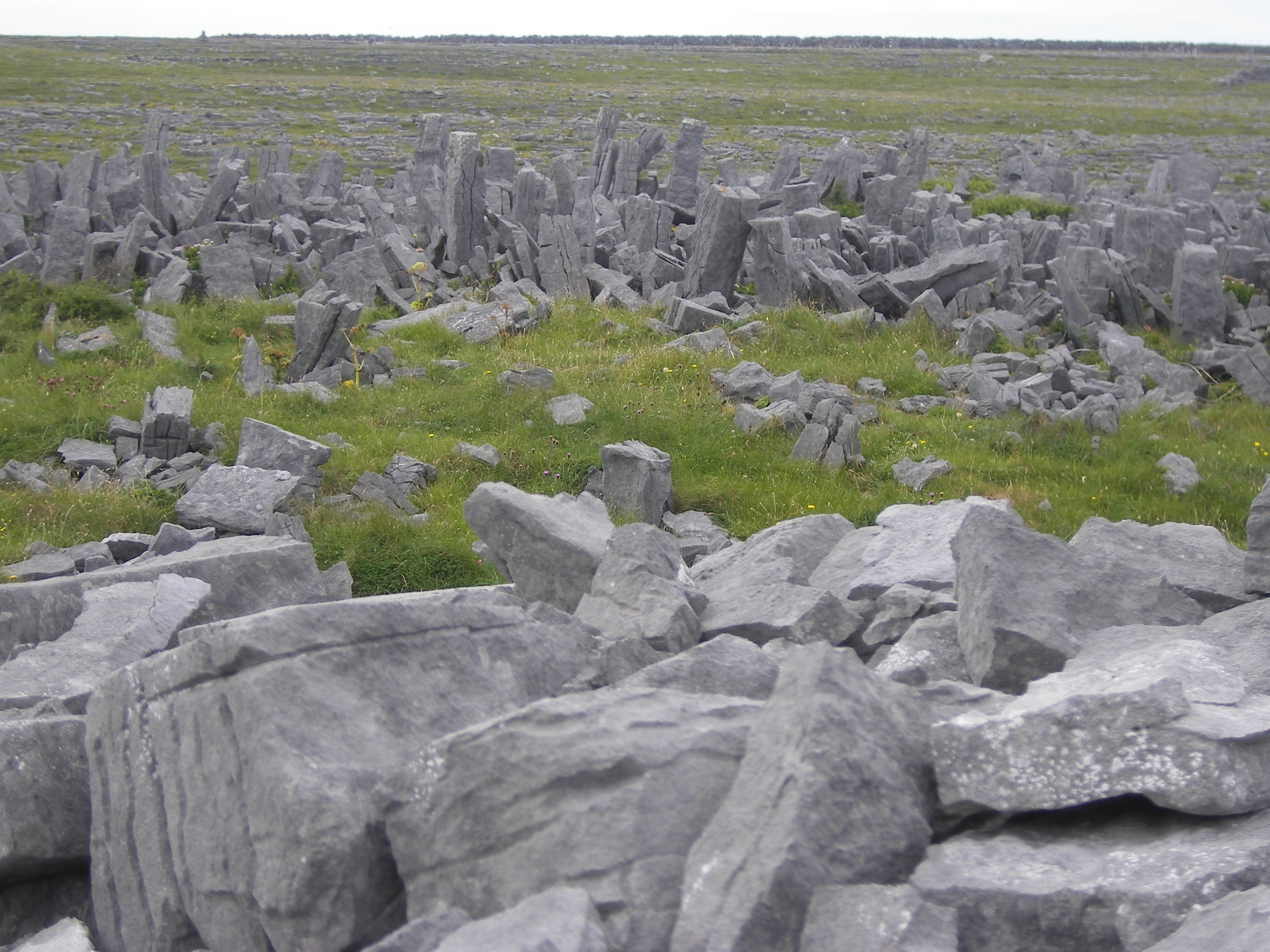 Les chevaux de frise devant le fort